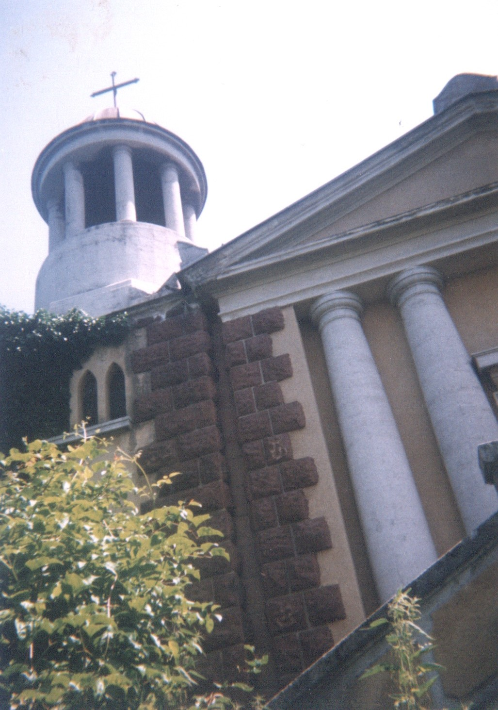 (H) Magyarország - romos kápolna az erdőben / ruined chapel in the woods (július 1996)